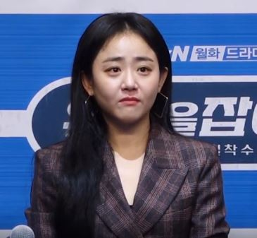 tvN 월화드라마 '유령을 잡아라' 제작발표회가 21일 오후 서울 구로구 신도림 라마다호텔에서 열렸다.